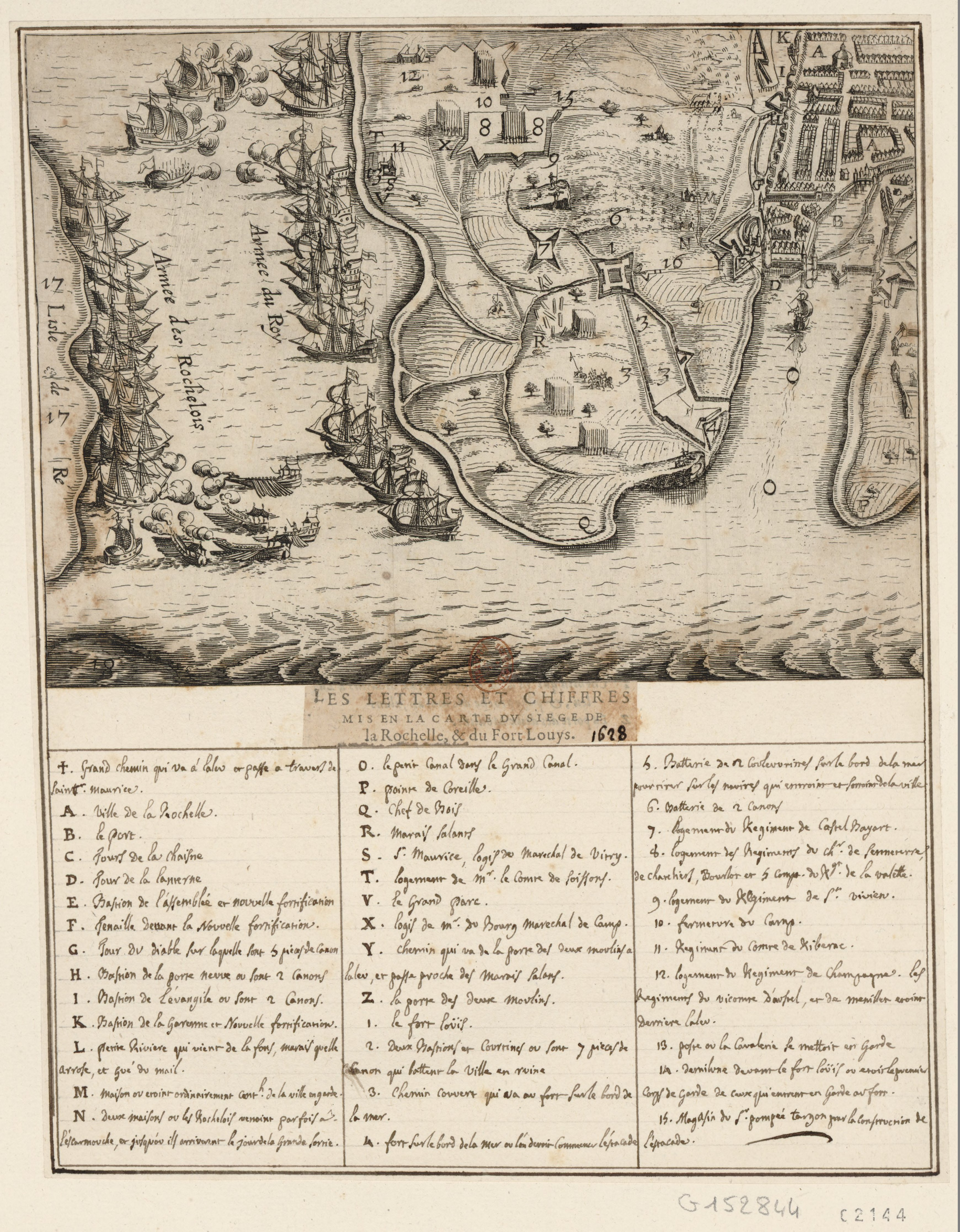 Titre : Plan de La Rochelle et du fort Louis : [estampe] Éditeur : [s.n.] Sujet : La Rochelle (Charente-Maritime) -- 1627-1628 (Siège) Type : Scènes historiques -- 17e siècle,image fixe,estampe Format : 1 est. : gravure à l'eau-forte Format : image/jpeg Droits : domaine public Identifiant : ark:/12148/btv1b8402064m Source : Bibliothèque nationale de France, département Estampes et photographie, RESERVE QB-201 (25)-FOL Relation : Notice de recueil : Relation : Appartient à : [Recueil. Collection Michel Hennin. Estampes relatives à l'Histoire de France. Tome 25, Pièces 2136-2190, période : 1628-1629] Relation : Description : Référence bibliographique : Hennin, 2144 Provenance : bnf.fr Date de mise en ligne : 26/04/2010